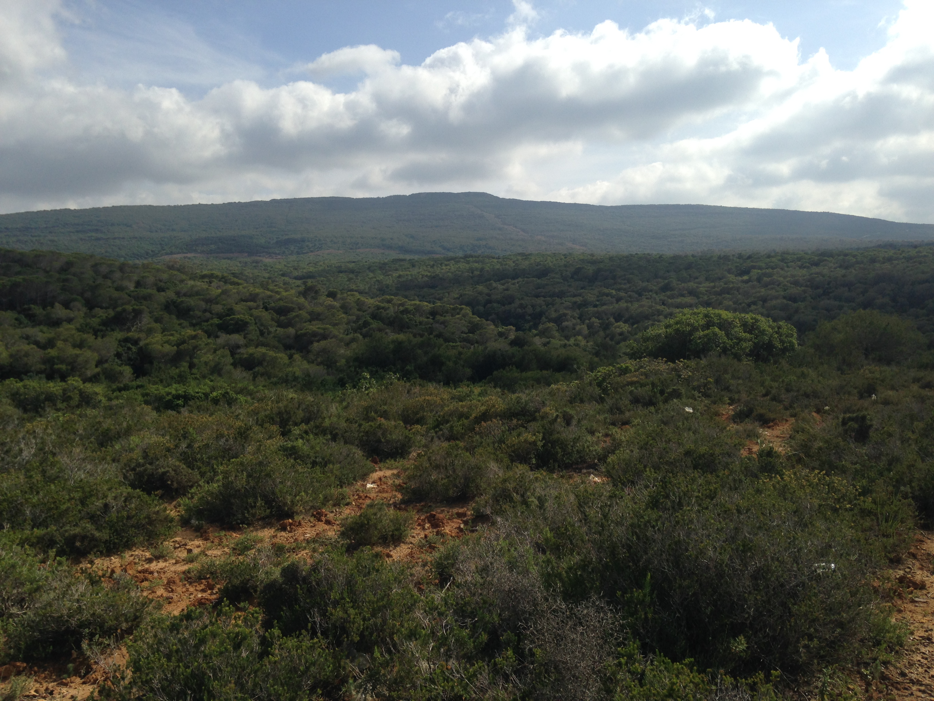 forêt du village de Zougueg au Cap bon Tunisie